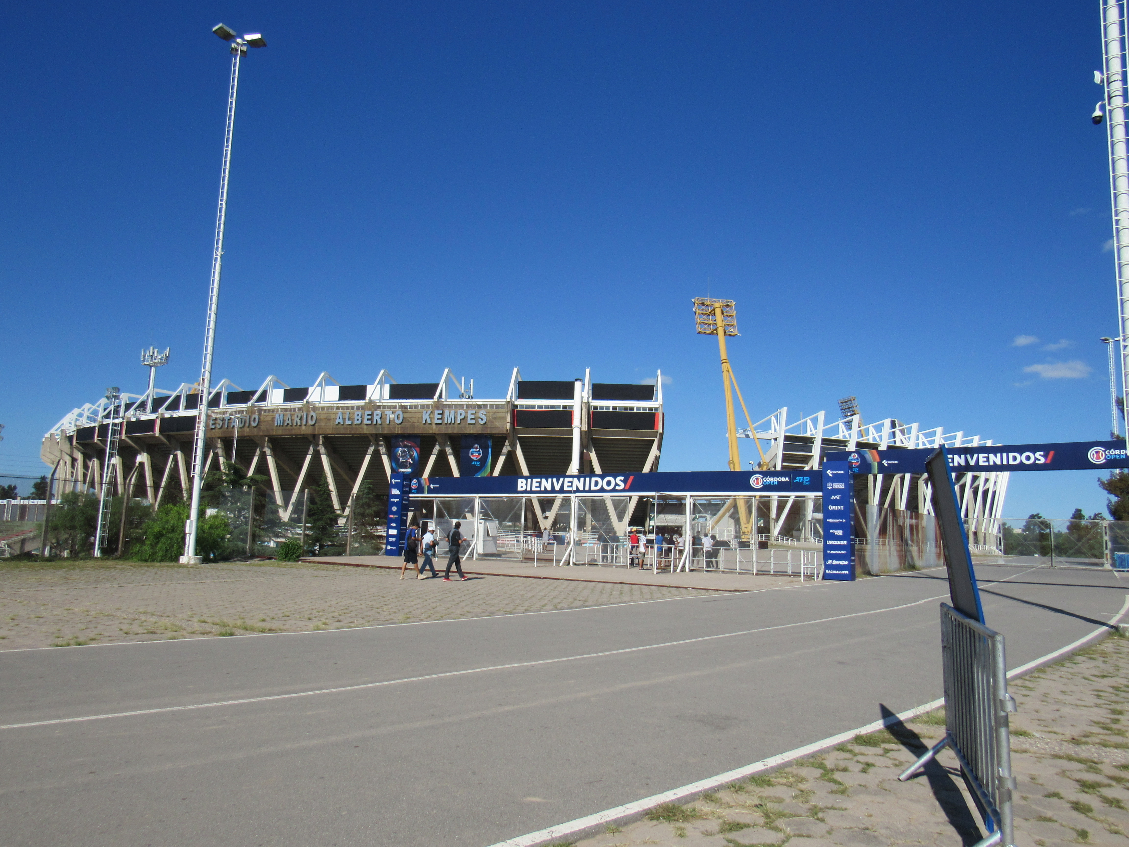 ATP 250 Córdoba Open 2019, Primera Ronda del Cuadro Principal - Ingreso al Predio del estadio Mario Alberto Kempes